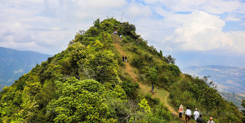 नेपाली: किरातीहरुको आदिम उद्गम थलो तुवाचुङ जयाजुङ डाडाँ